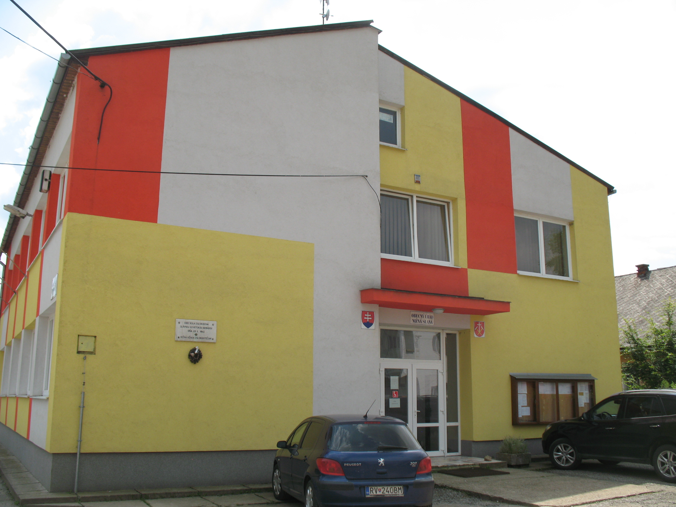 Alsósajó